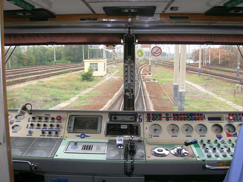 Кабина электровоза ДЭ1, общий вид